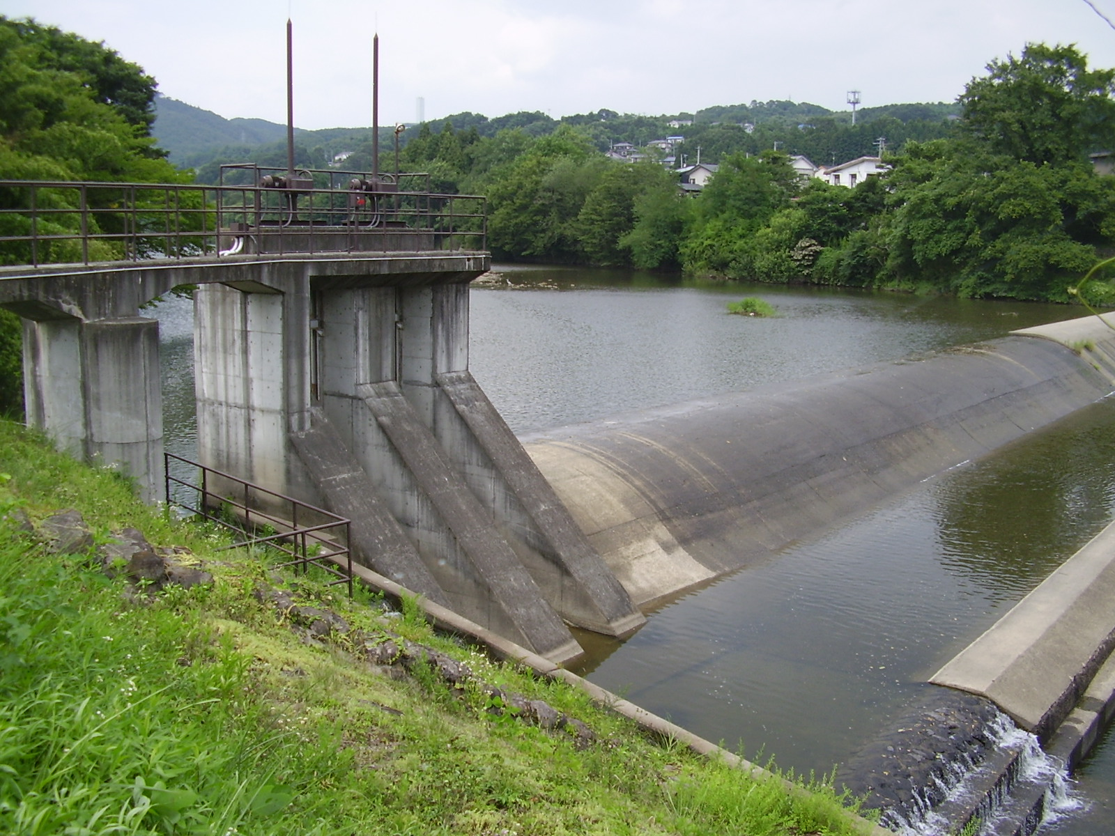 三居沢発電所へ導水するために設置された、宮城県仙台市青葉区郷六にある広瀬川の北堰。2011年8月16日に投稿者によって撮影。